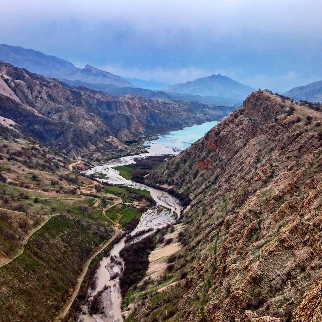 رودخانه لیله کوردی: ڕووباری لێڵە